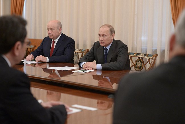 Владимир Путин провёл встречу с главами делегаций XIII заседания Совещания руководителей органов безопасности и разведывательных служб государств – участников Содружества Независимых Государств по вопросам разведывательной деятельности.